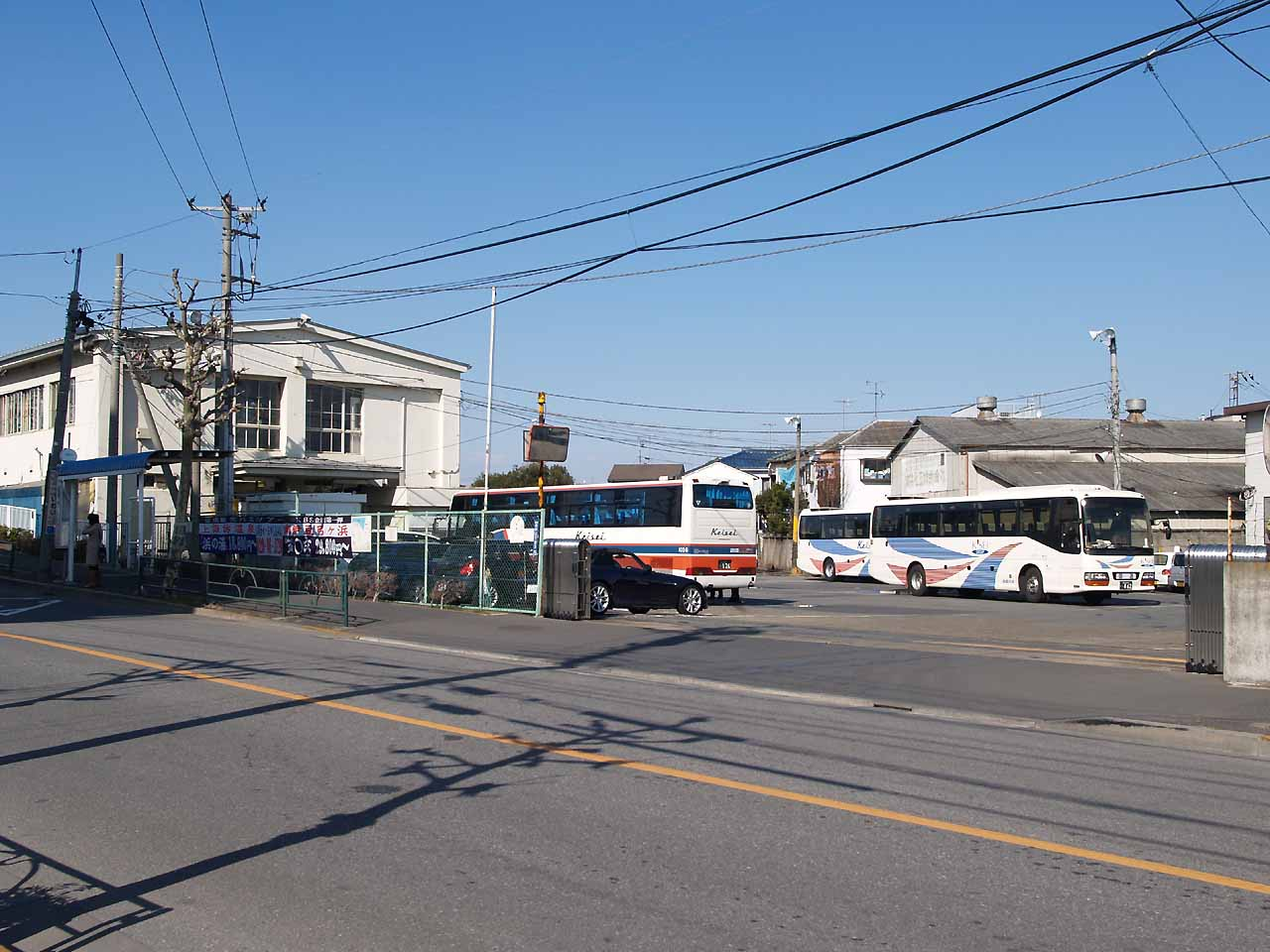 Keisei Bus Okudo Dept.（京成バス奥戸営業所）